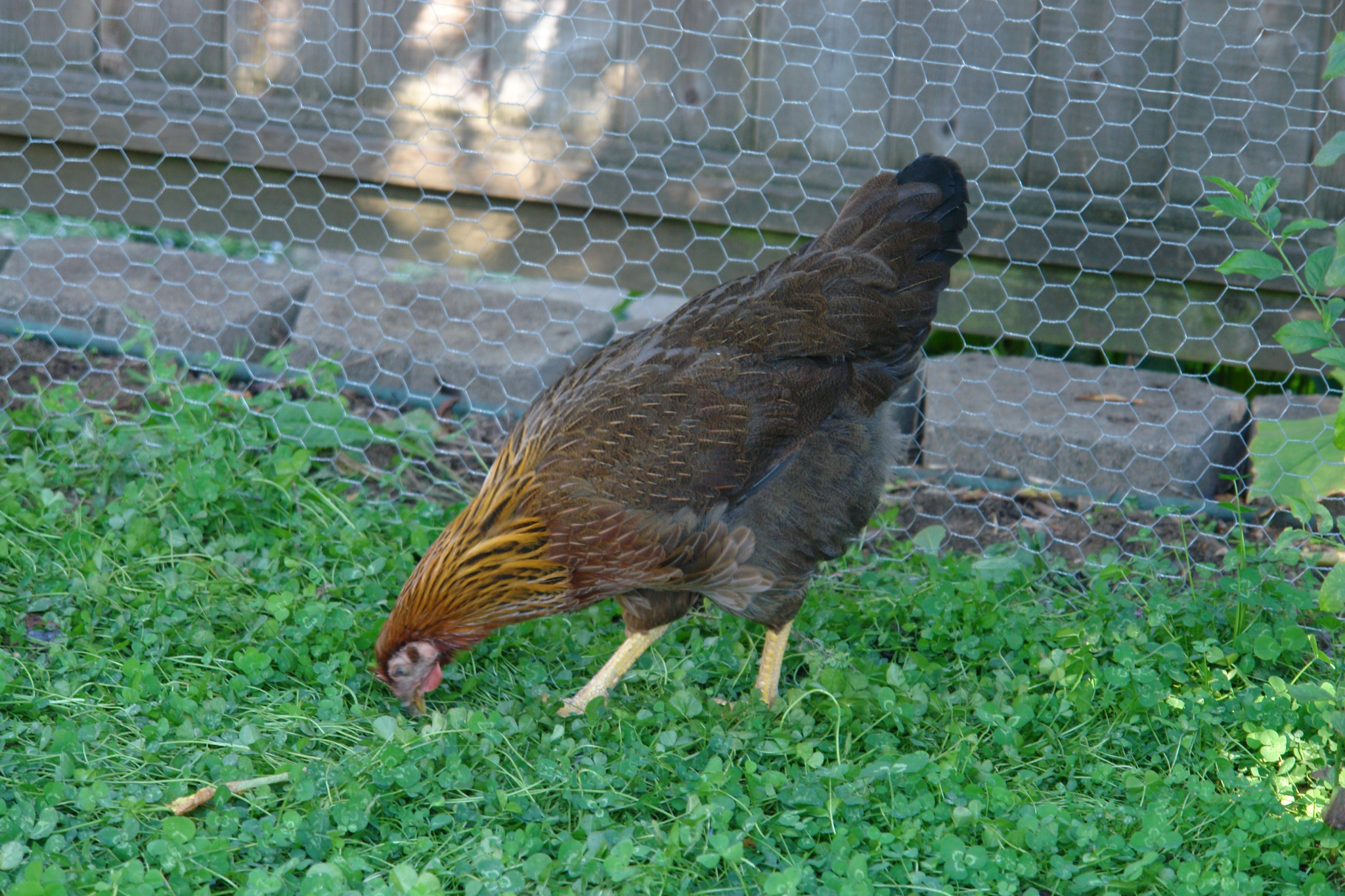 A Welsummer pullet.